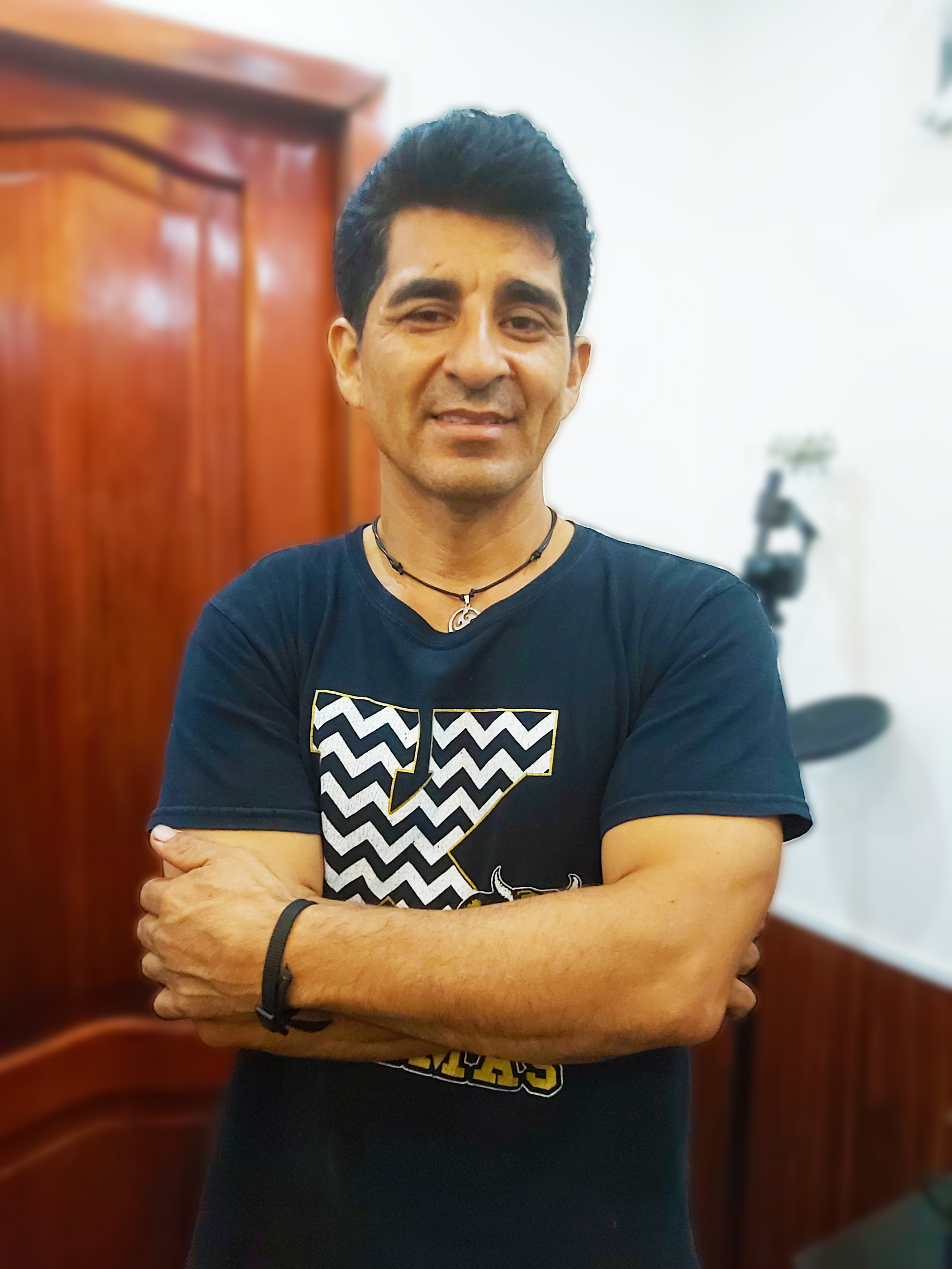 Nixon Chalacamá, director de cine y actor, en 2020.